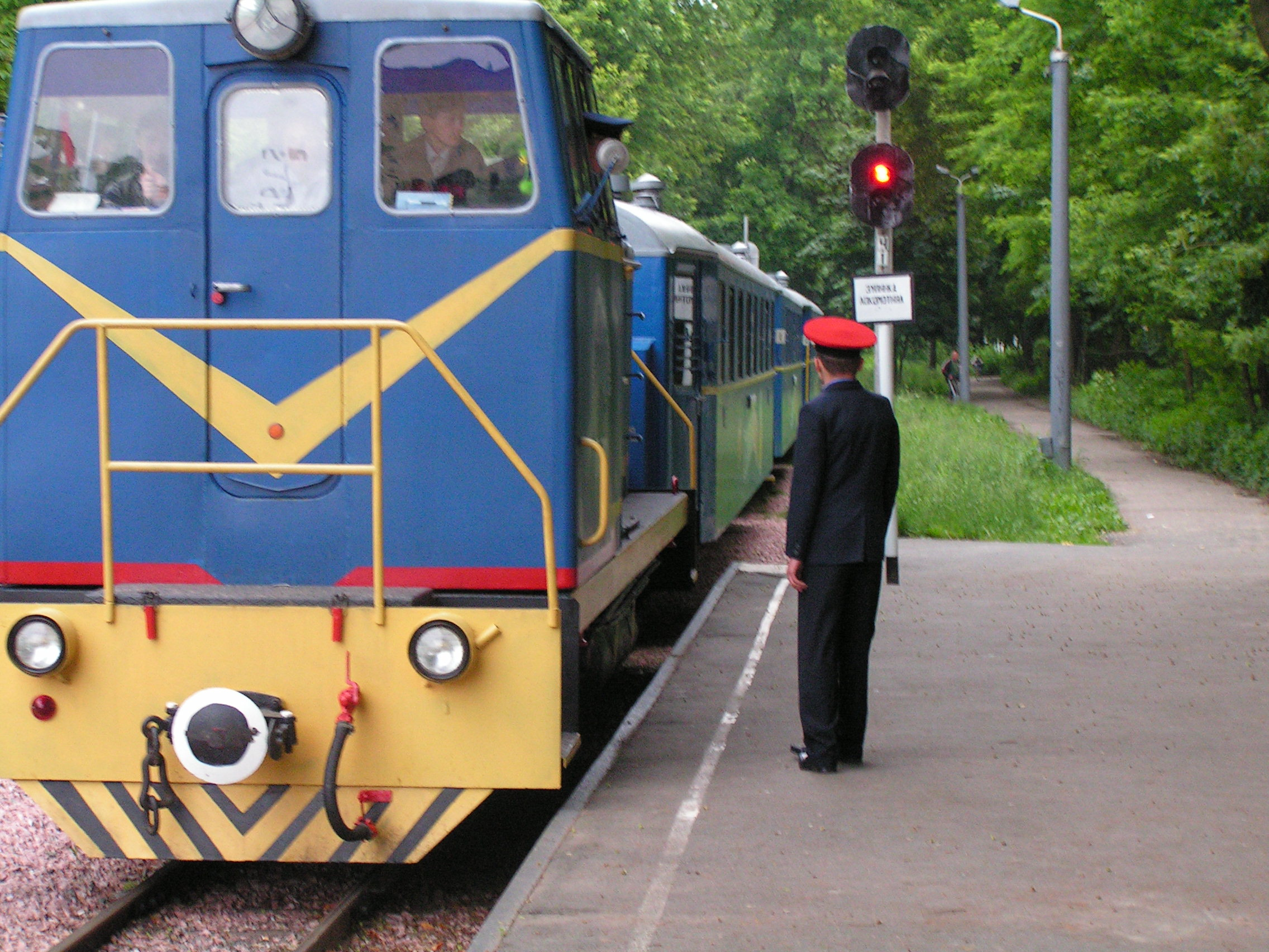 Тепловоз ТУ7 на станции Киевской детской железной дороги